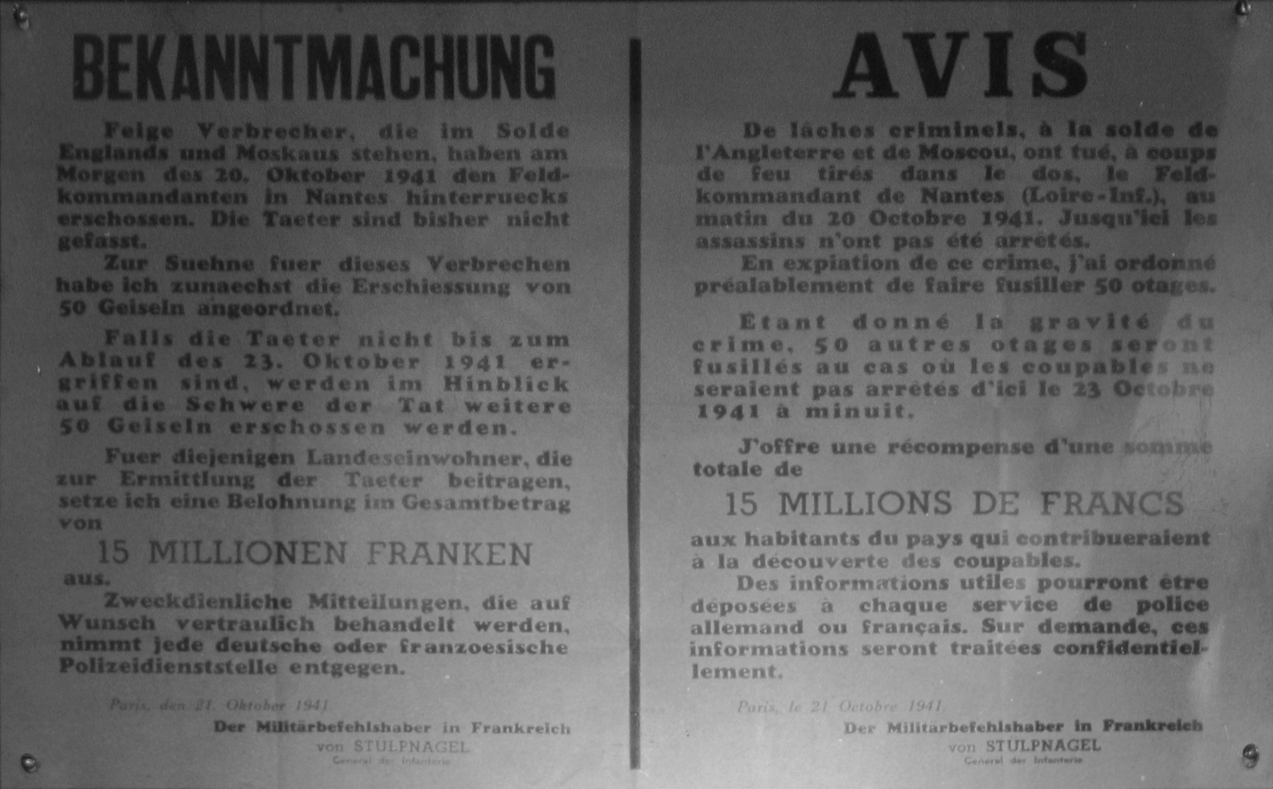 Exposition métro Guy Môquet, Paris.